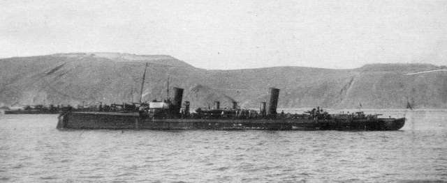 Миноносец «Бдительный» («Кит») в Порт-Артуре.